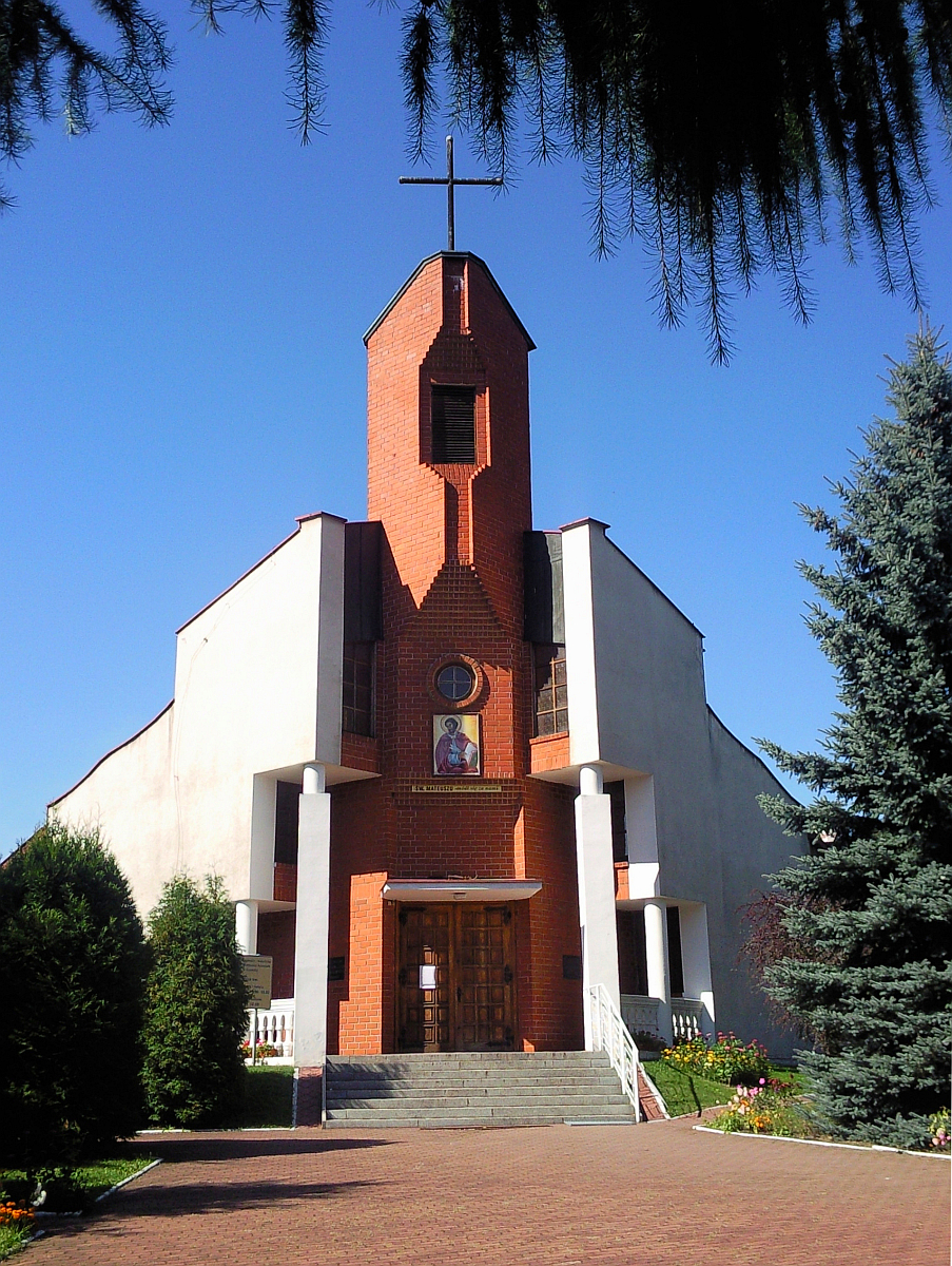 Parafia rzymsko-katolicka p.w. Św. Mateusza Apostoła przy ulicy Powstańców Śląskich 34. Parafia pw. św. Mateusza Ap. w Czeladzi została ustanowiona 25 maja 1985 r. przez biskupa częstochowskiego Stanisława Nowaka. Pierwszym proboszczem został ks. Jan Kantor. Z inicjatywy biskupa częstochowskiego Stefana Bareły 27 września 1983 r. dla potrzeb duszpasterskich wiernych osiedla „Musiała" w Czeladzi został powołany wikariat terenowy parafii pw. św. Stanisława BM. Kult sprawowano początkowo w niewielkiej kaplicy przy ul. Powstańców Śląskich. Staraniem ks. Jana Kantora i wiernych przystąpiono do budowy kaplicy i pomieszczeń kościelnych. Nowe budowle, w tym kaplicę, salę katechetyczną i mieszkania dla duszpasterzy, pobłogosławił 21 września 1986 r. biskup pomocniczy diecezji częstochowskiej. Przebudowy kaplicy na okazalszy kościół dokonał ks. Jan Gaik. Jego uroczystego poświęcenia (konsekracji) 21 września 1995 r. dokonał biskup pomocniczy diecezji sosnowieckiej Piotr Skucha.